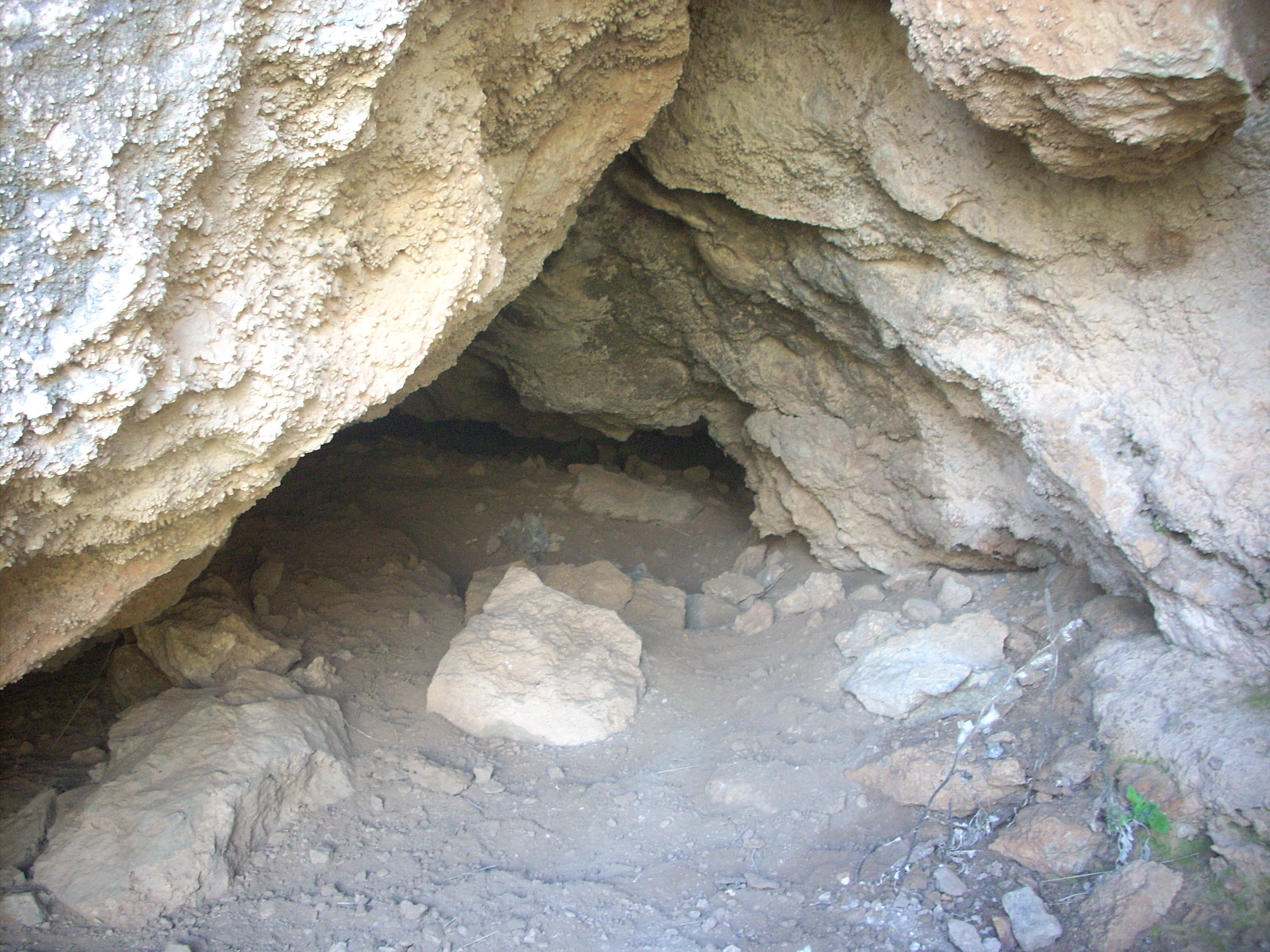 Detalle del suelo de la Cueva del Rayo